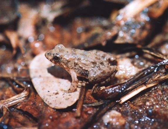 Pseudopaludicola mystacalis